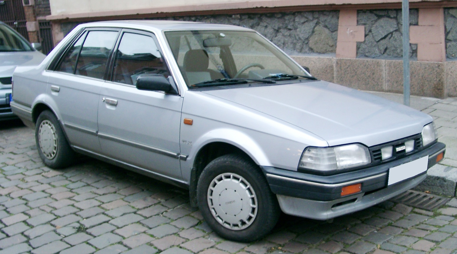 Mazda 323 BF Stufenheck